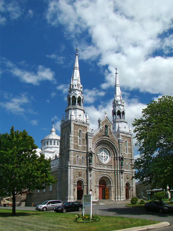 Basilique Sainte-Anne, Varennes, Montérégie, Québec, Canada.